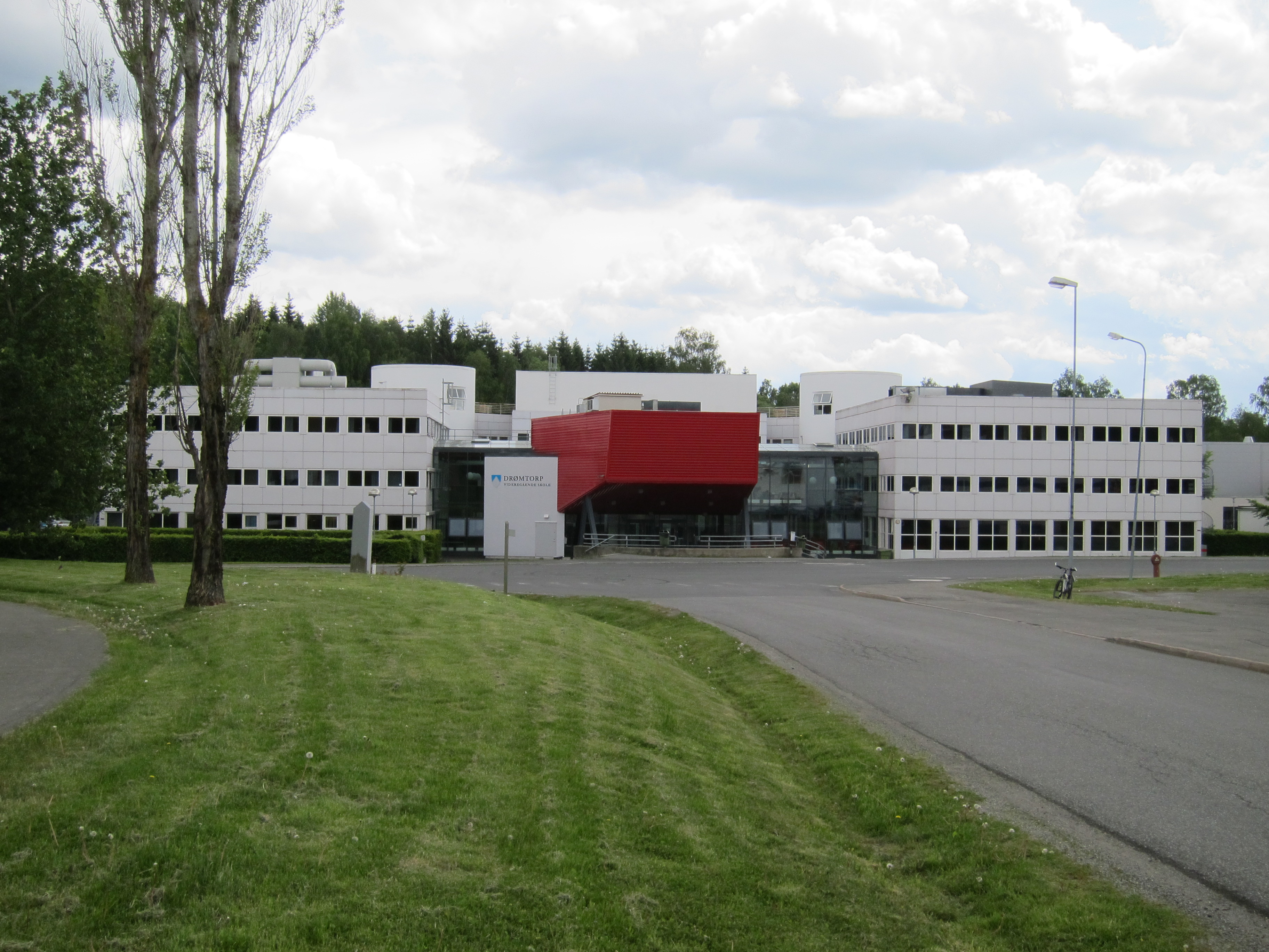 Drømtorp VGS in Ski, Norway, photo shot from the western side of the school